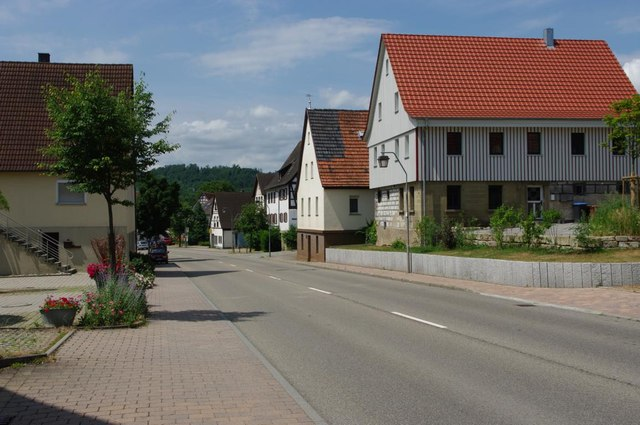 Michelfeld, 5 km von Schwäbisch Hall, Deutschland entfernt (Zone 32)